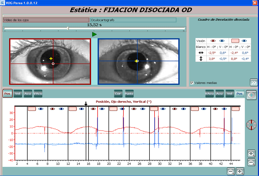 Al ocluir el OD se evidencia el movimiento lento de elevación de este ojo, que vuelve a descender al destaparle.